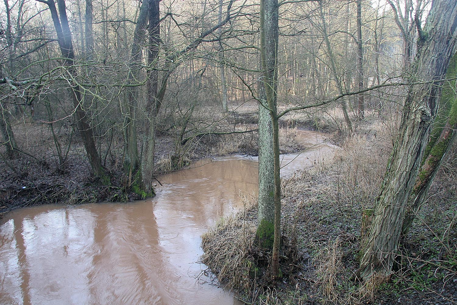 Přírodní památka Údolí Bystřice nedaleko od města Hořice v Podkrkonoší, district Jičín autor:Prazak date:2. 1. 2007